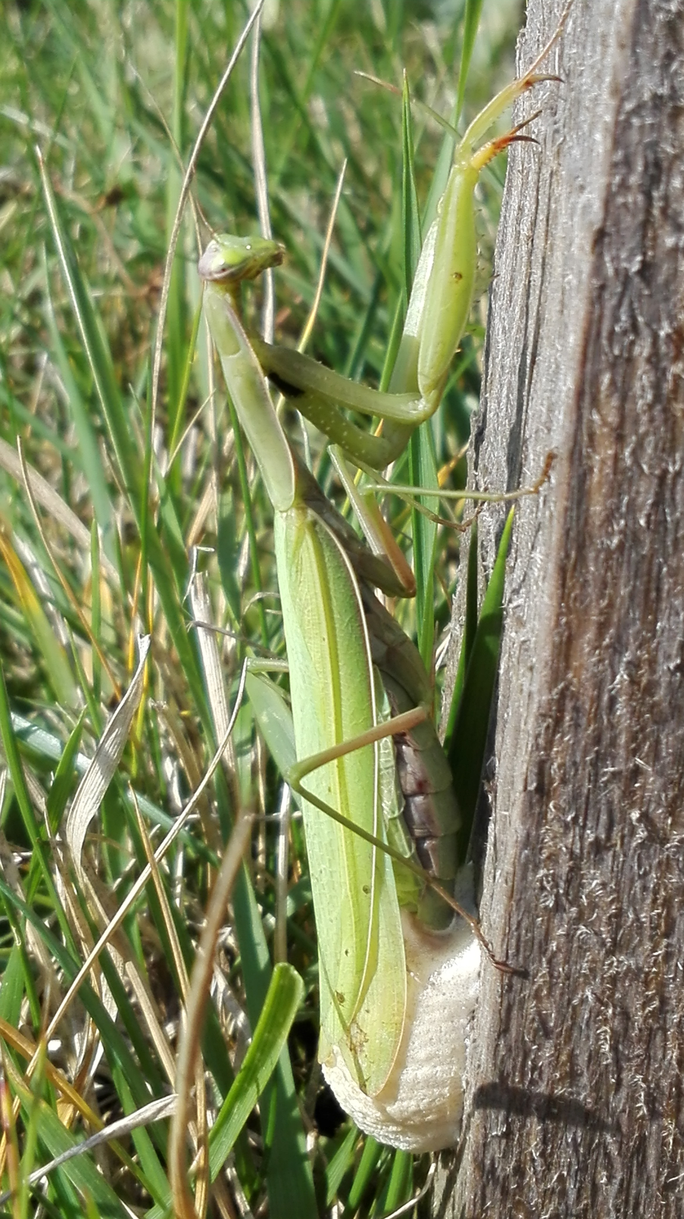 Mantis religios (Imádkozó sáska peterakás közben)